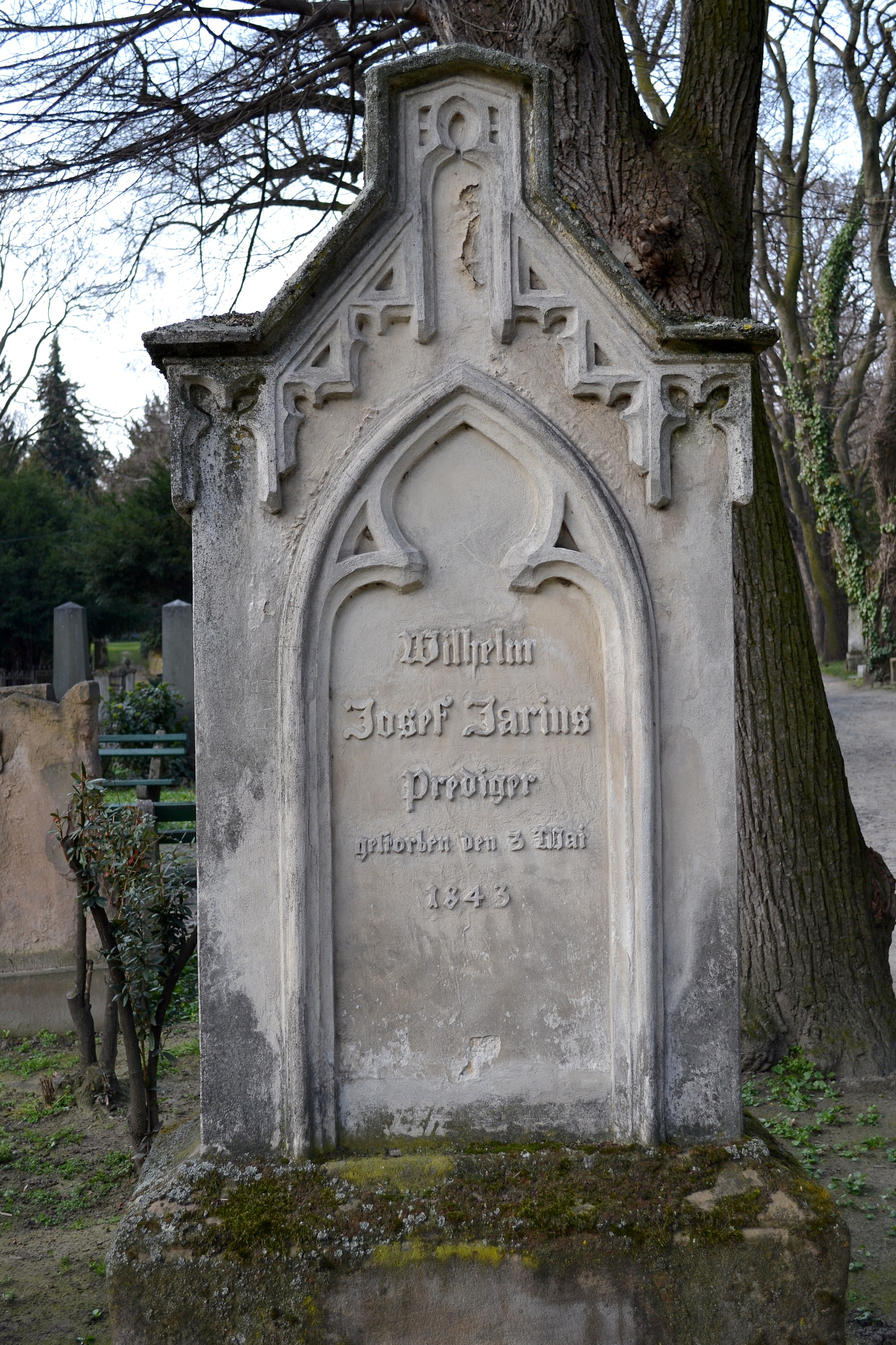 Náhrobok Wilhelma Josefa Jariusa (1772 - 1843), evanjelického kňaza